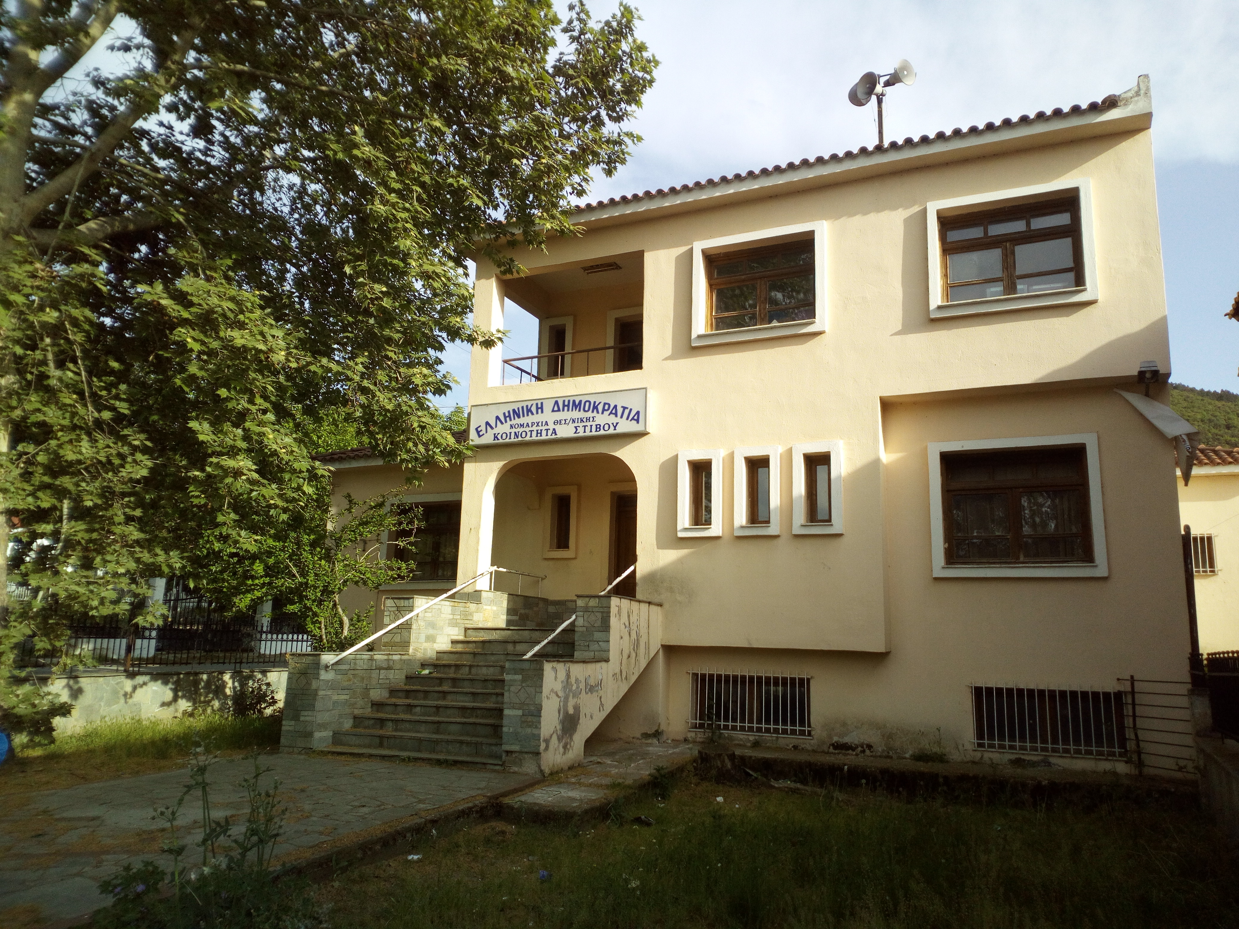 DS1 20180429 181034